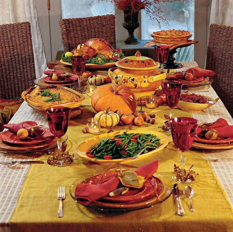 Imagen de acción de gracias, prueba.